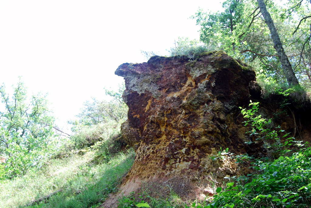 Énorme nodule ferrugineux dégagé de l'ocre par l'érosion à Rustrel dans le Colorado provençal